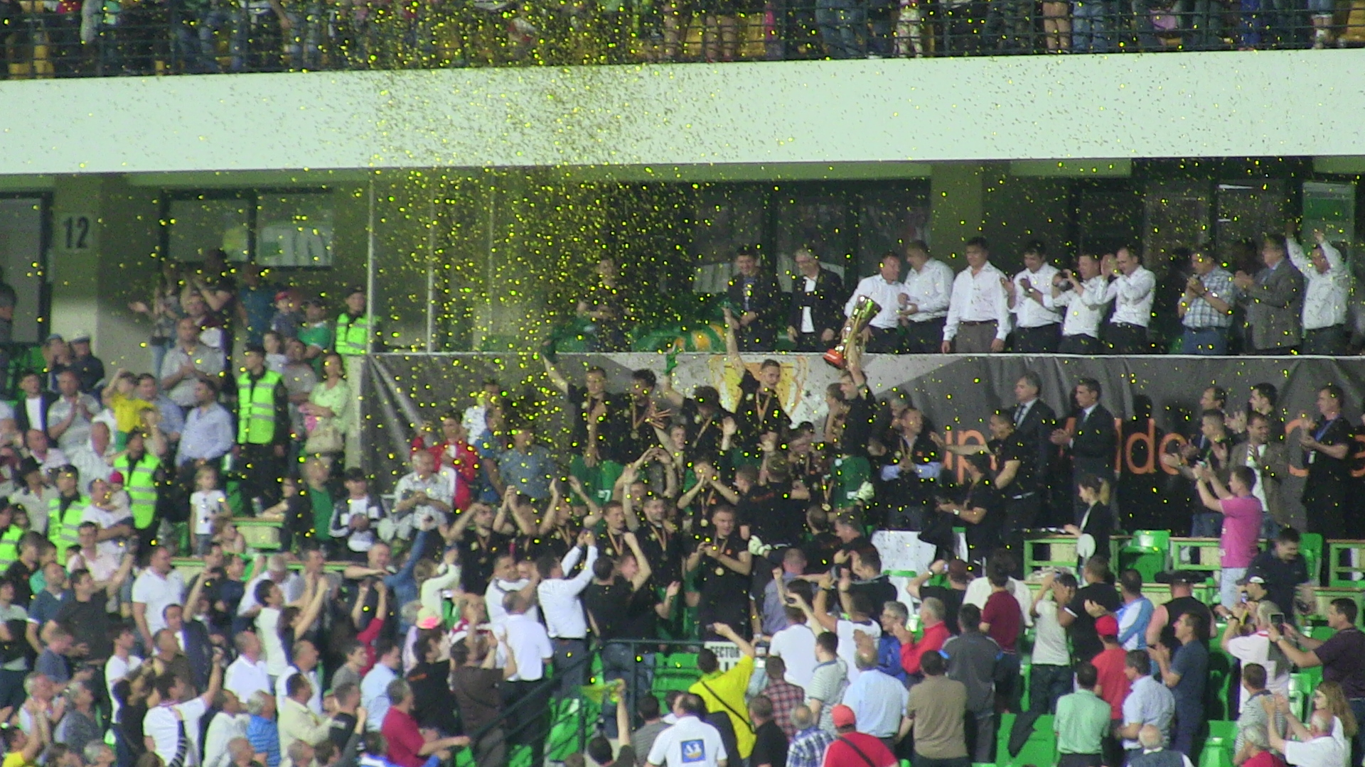 24 мая 2014 Кишинёв, Стадион Зимбру